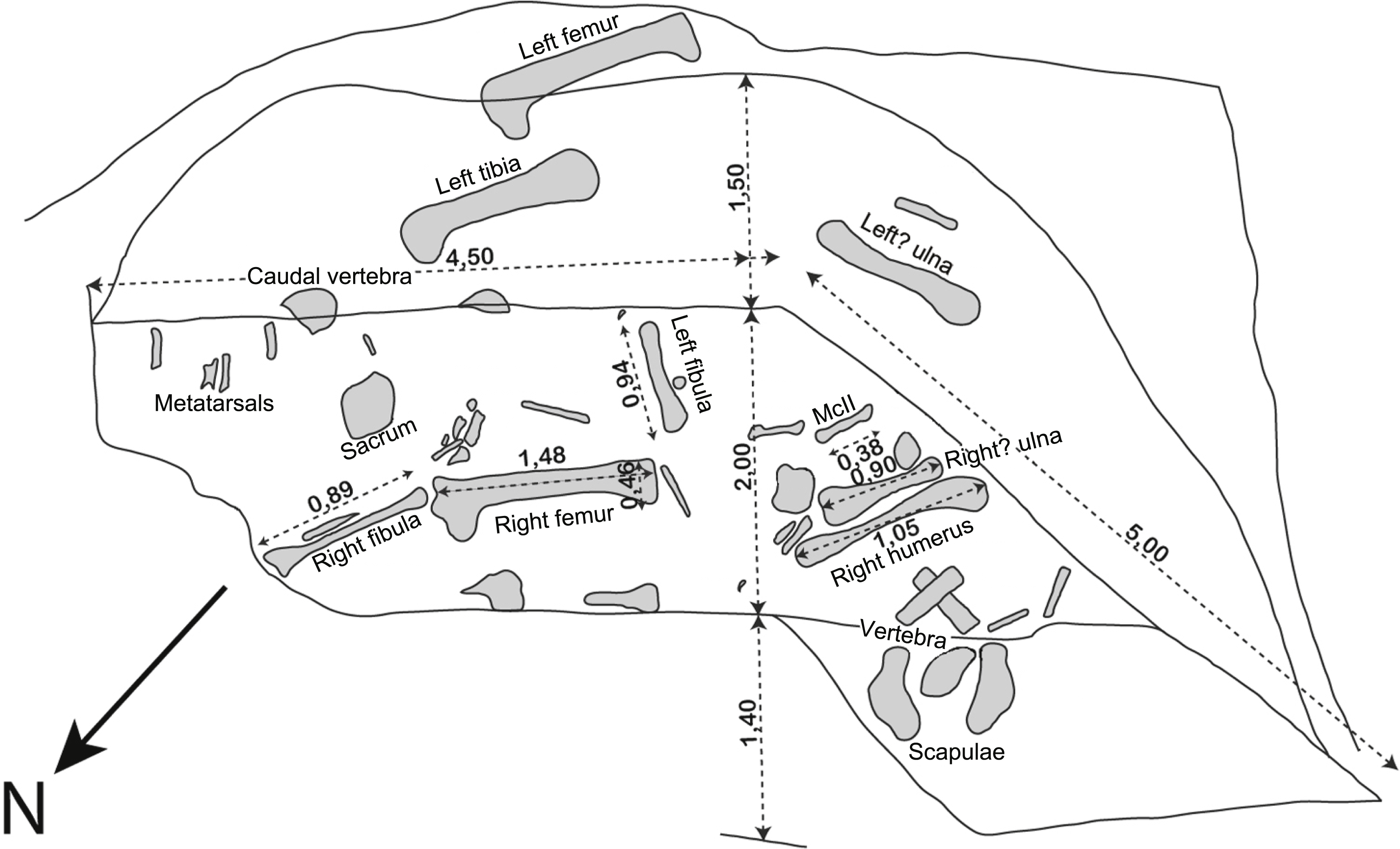 Original excavation plan of Vouivria damparisensis n. gen. n. sp. (modified from Dorlodot, 1934).